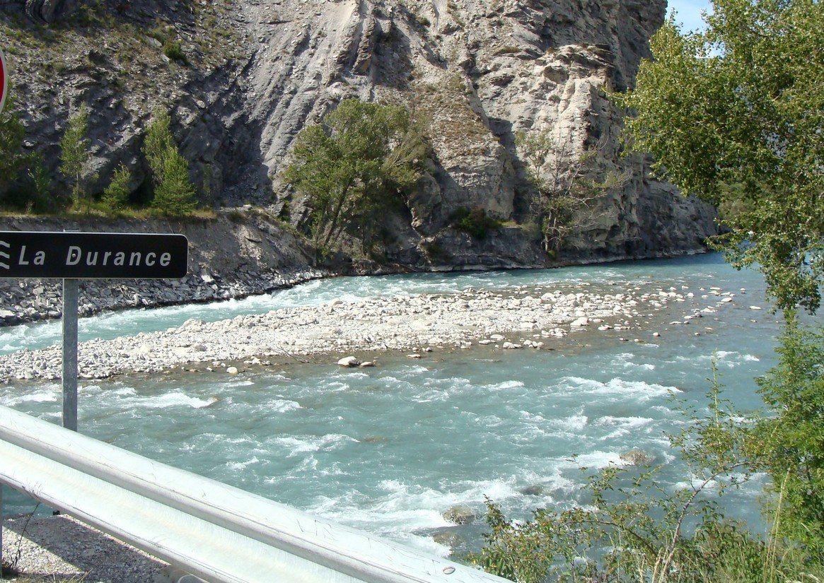 La Durance à la hauteur d'Embrun (Hautes-Alpes), peu avant son arrivée à la retenue de Serre-Ponçon.